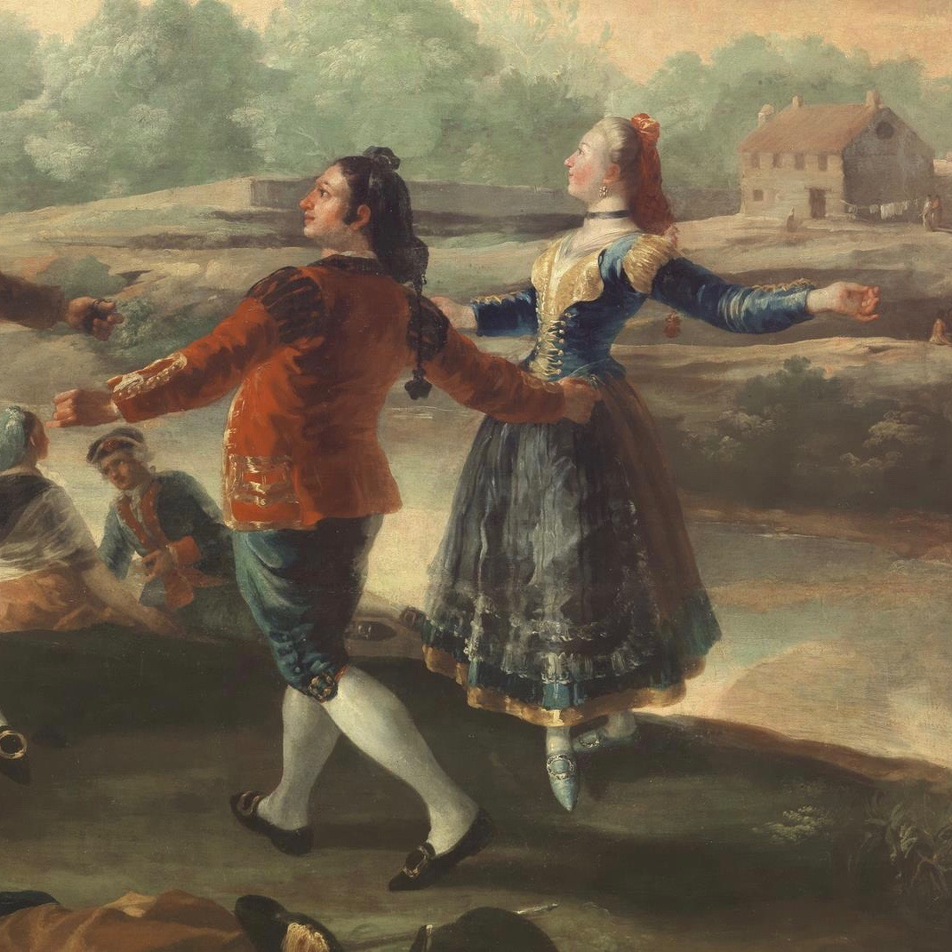 Francisco de Goya (1746–1828): El baile de San Antonio de la Florida (Baile a orillas del Manzanares), 1776/77, Ausschnitt. Museo del Prado, Madrid.